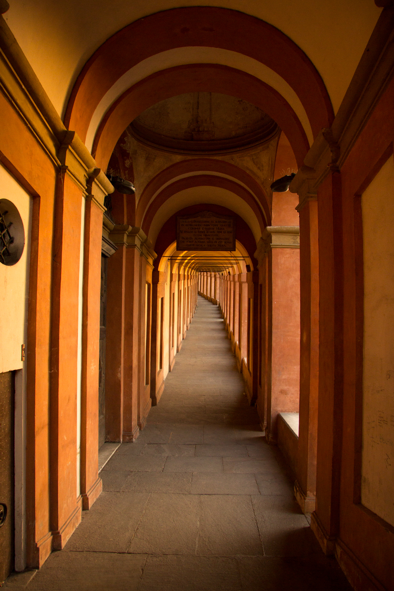 Portico di San Luca (da Porta Saragozza fino alla Basilica) This is a photo of a monument which is part of cultural heritage of Italy.